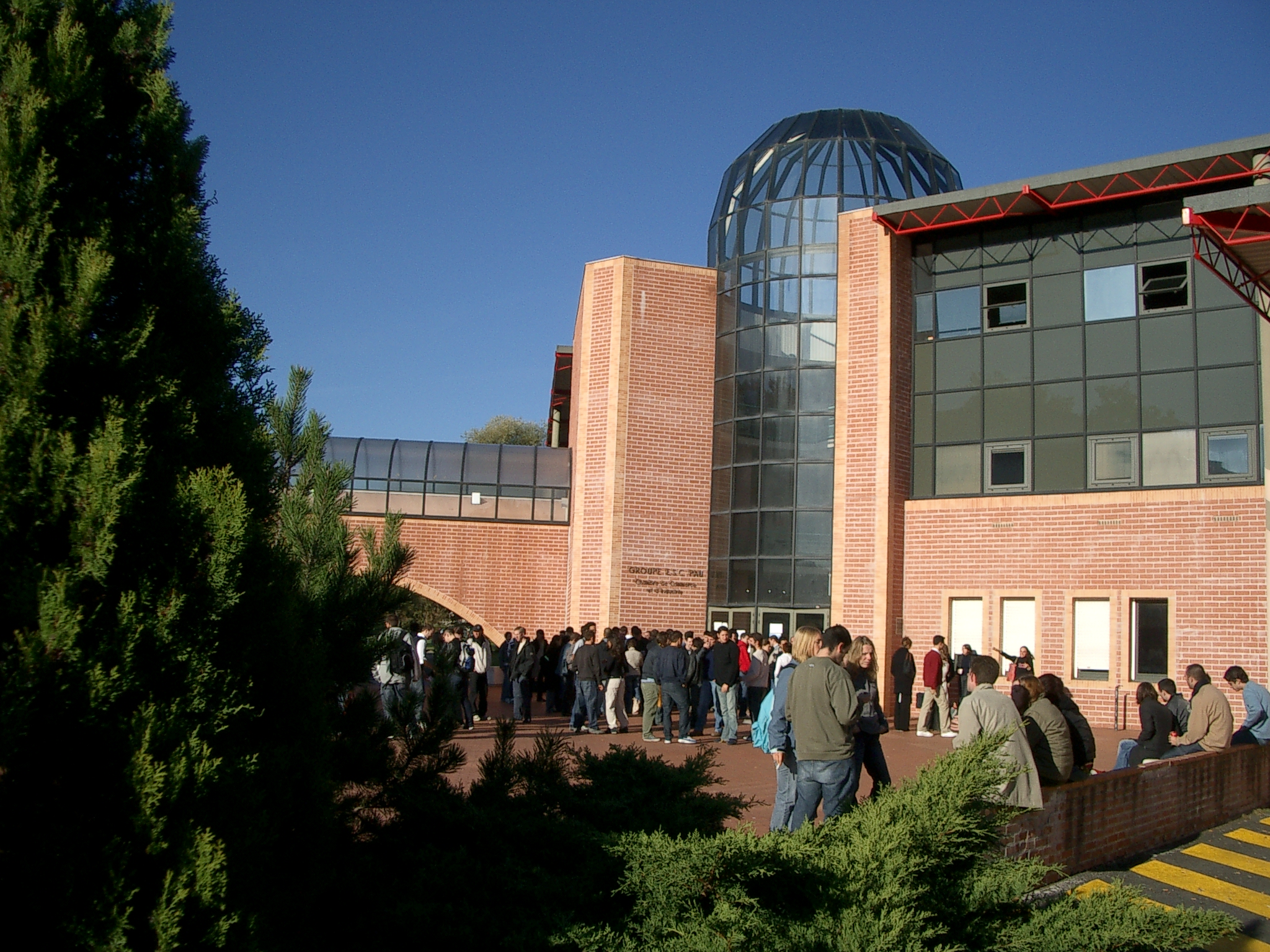 Parvis esc pau